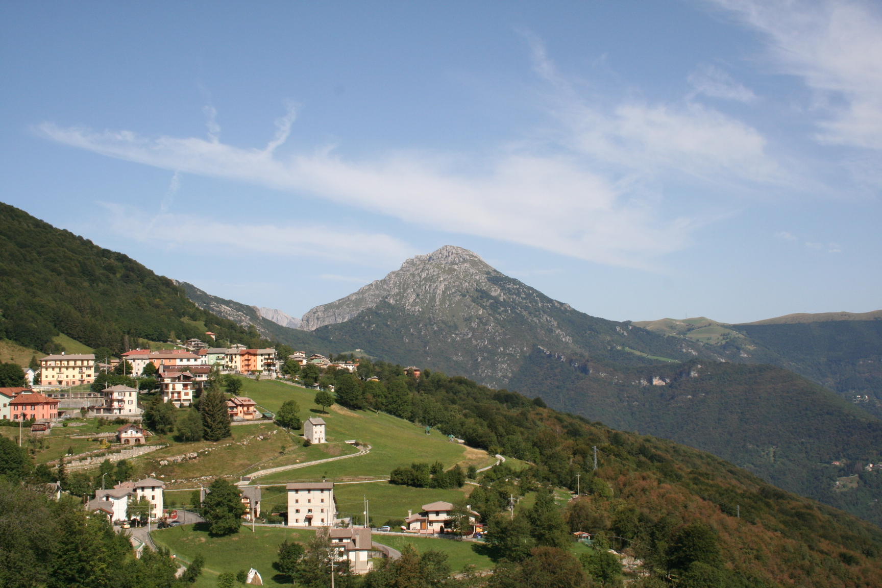 Costa Valle Imagna, panorama.